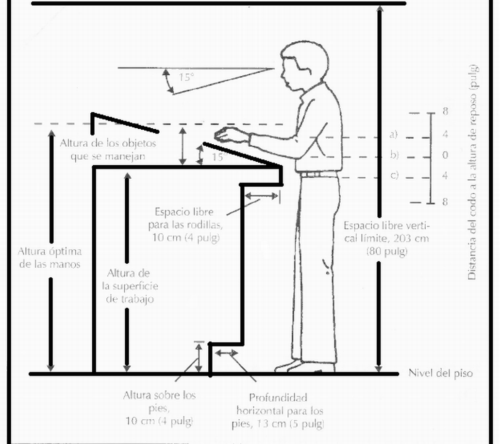 Dimensiones estacion de trabajo de pie.